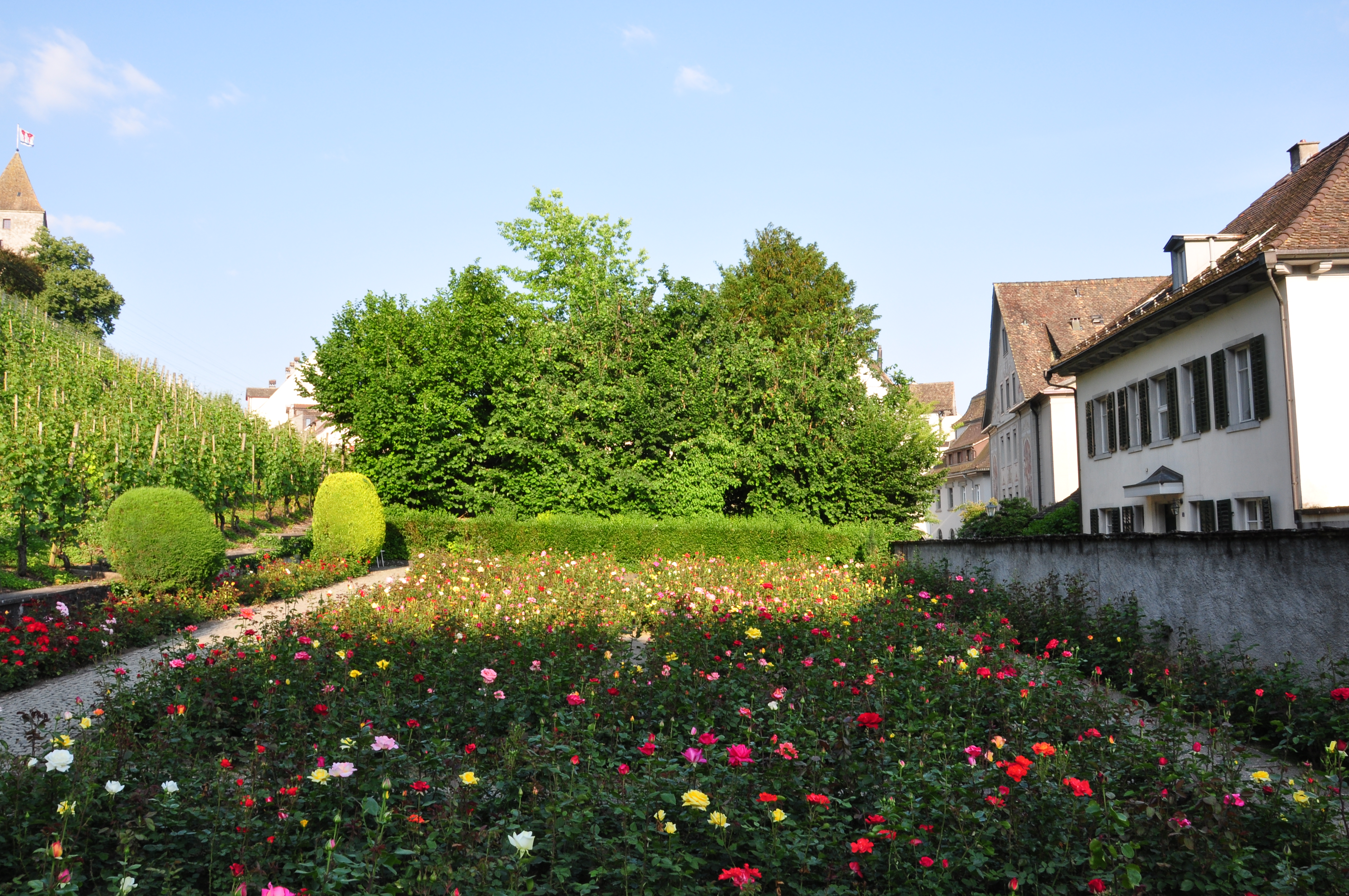 Rose garden in Rapperswil (Switzerland)